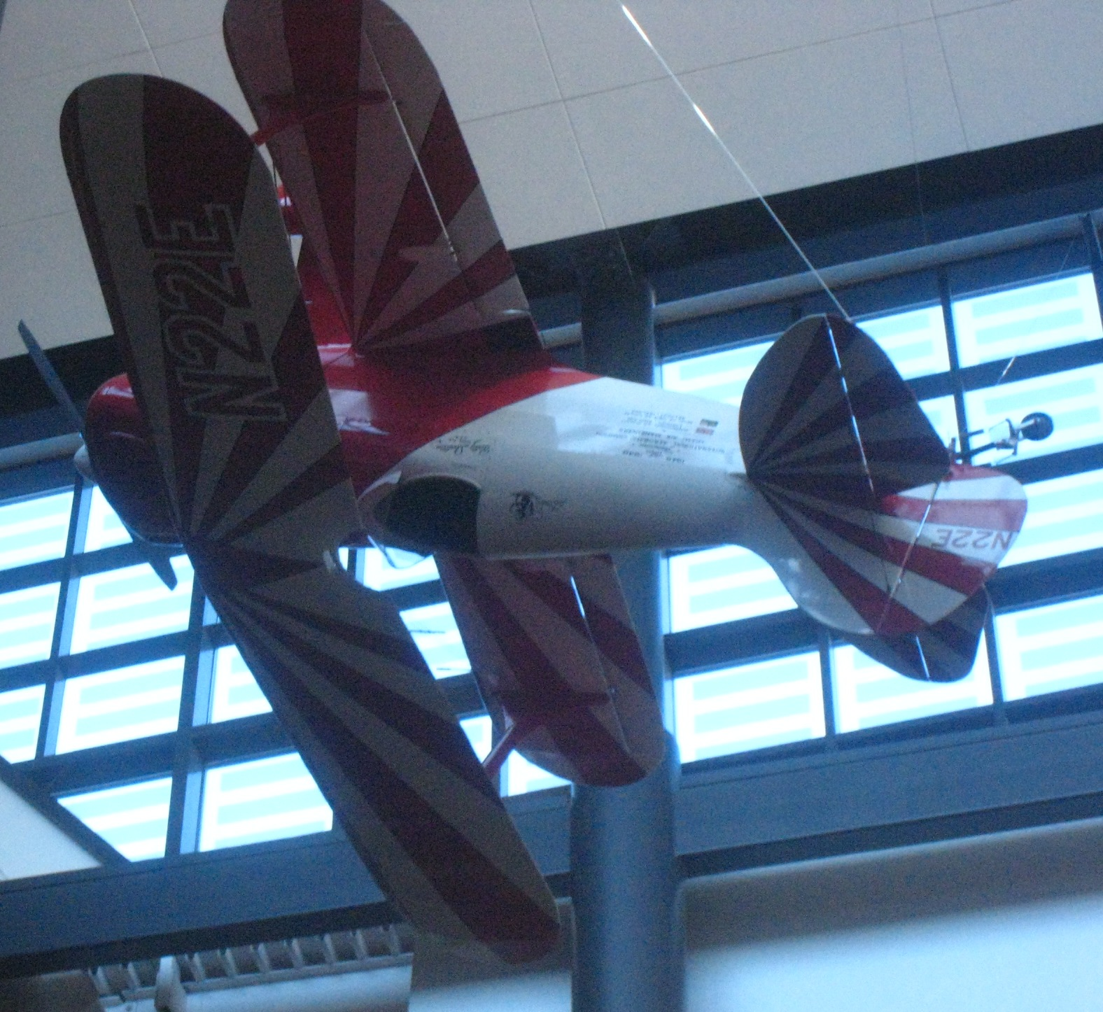 Pitts Lil Stinker